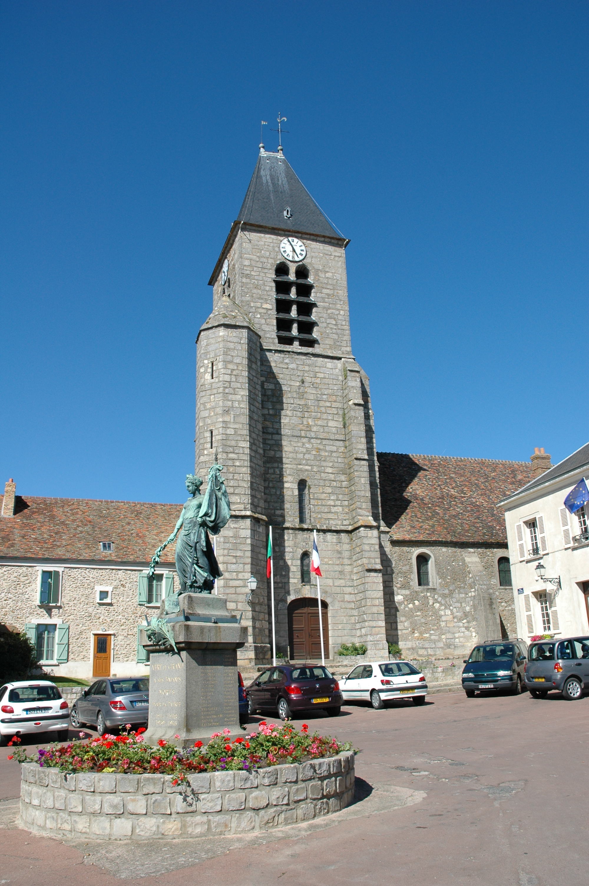 Eglise de Vert-Le-Grand